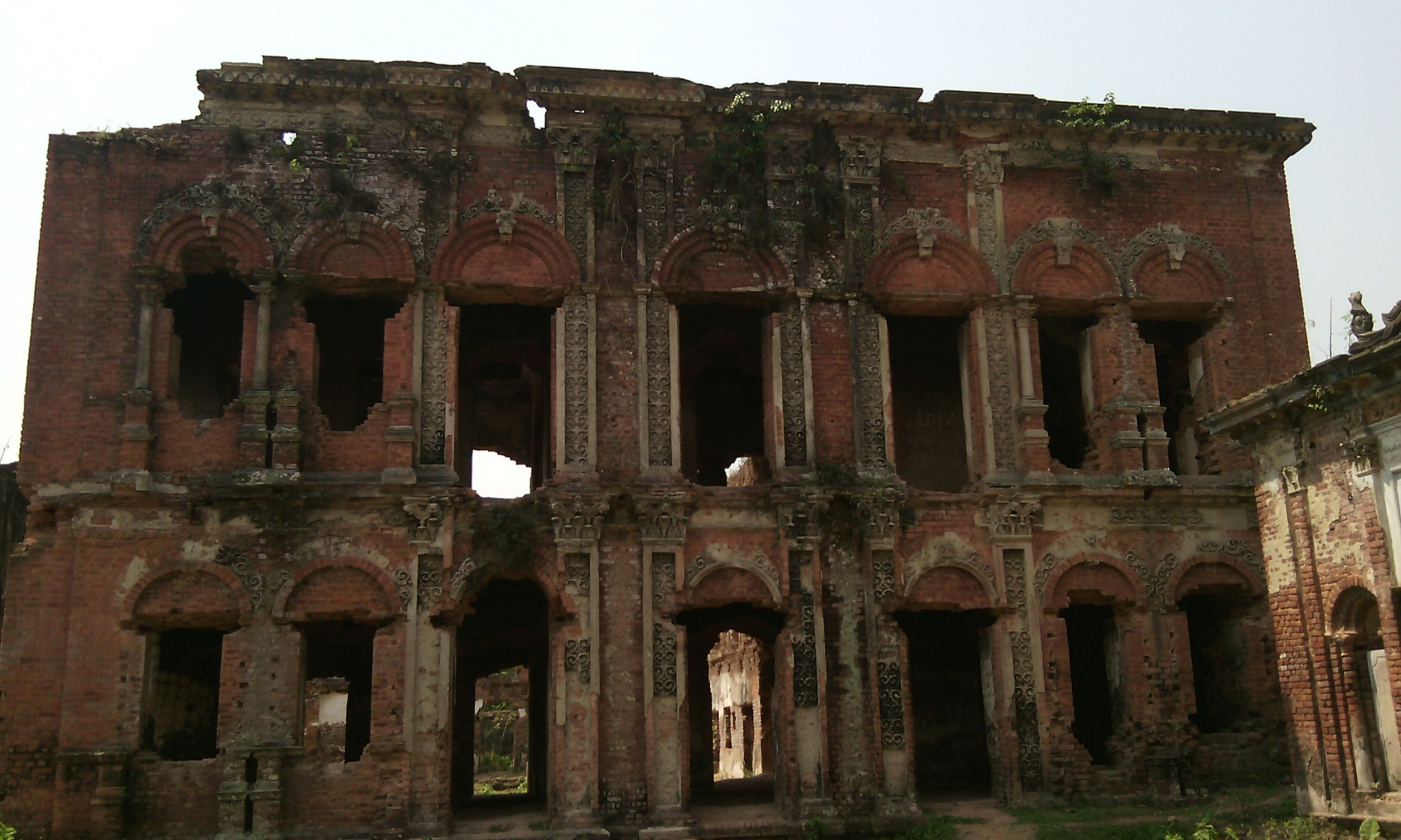 ধুবল হাটি প্রাসাদ